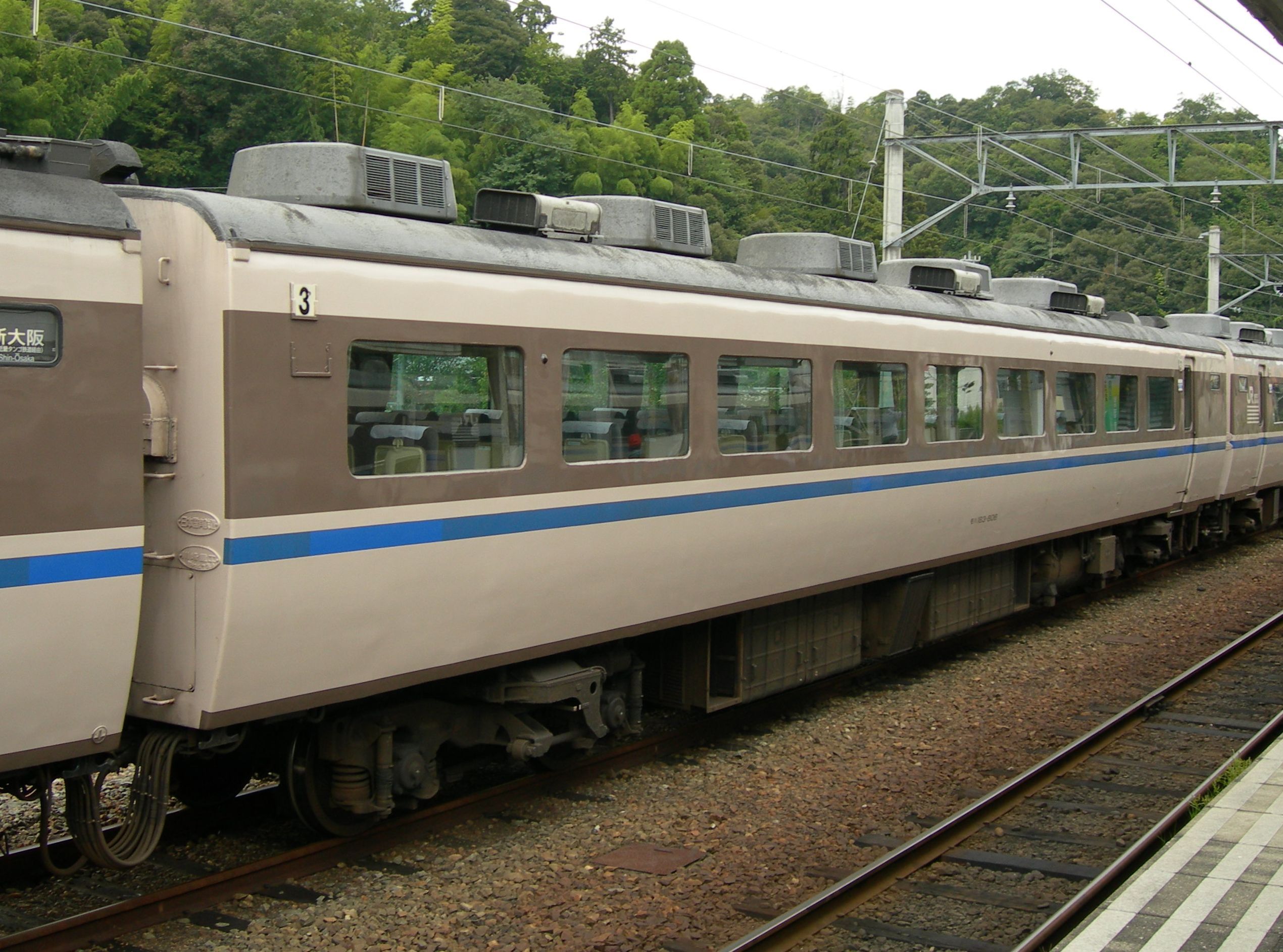 JR西日本 183系800番台